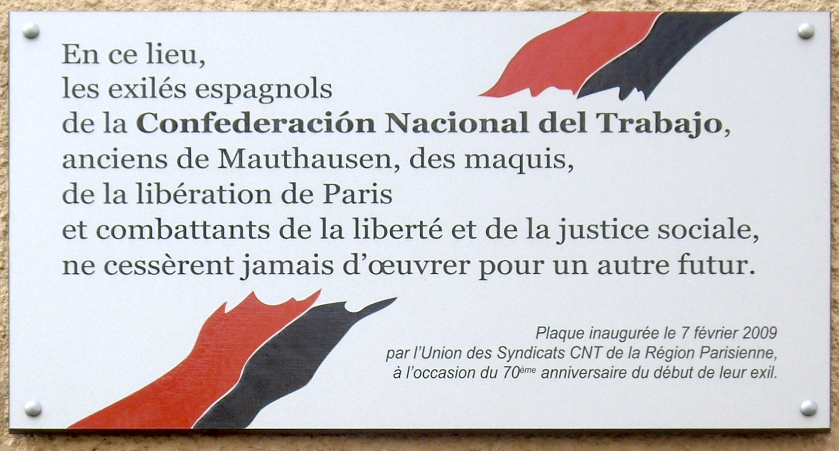 Plaque commémorative, 33 rue des Vignoles, Paris 20e.« En ce lieu, les exilés espagnols de la Confederación Nacional del Trabajo, anciens de Mauthausen, des maquis, de la libération de Paris et combattants de la liberté et de la justice sociale, ne cessèrent jamais d'œuvrer pour un autre futur.Plaque inaugurée le 7 février 2009 par l'Union des syndicats CNT à l'occasion du 70e anniversaire du début de leur exil. »